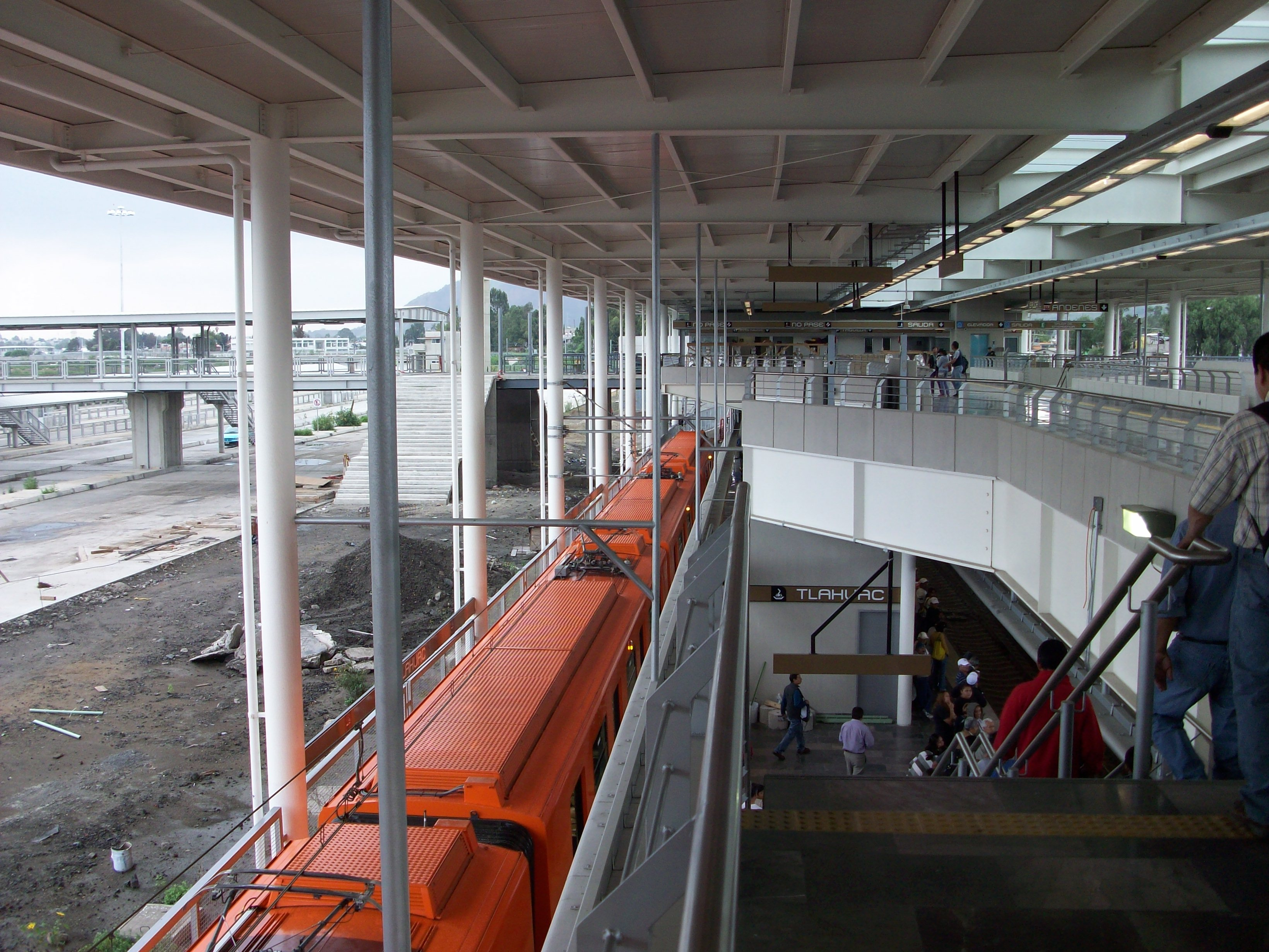 Estacion Tlahuac